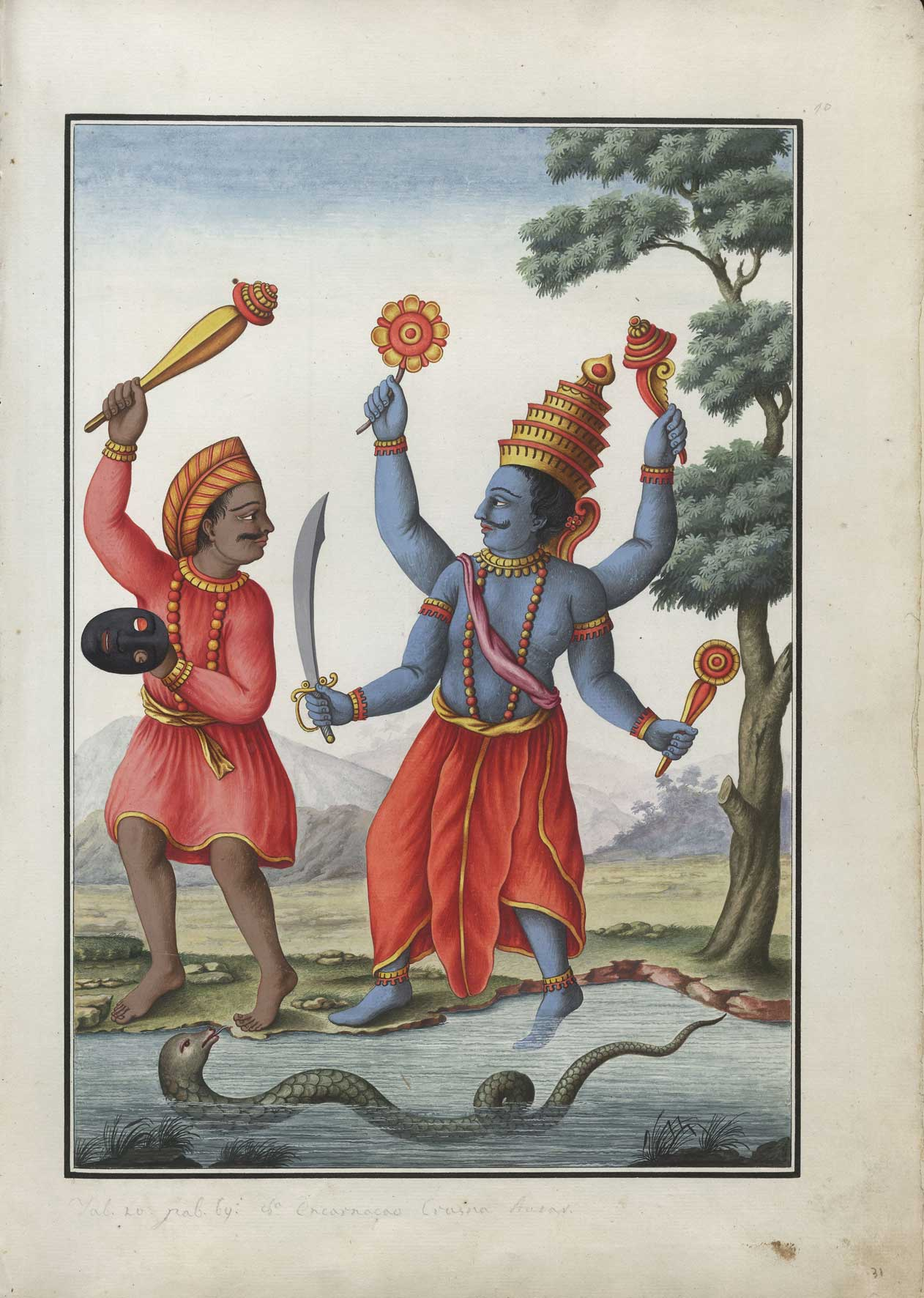 Aquarela representando o deus hindú Krishna ou Vishnu.